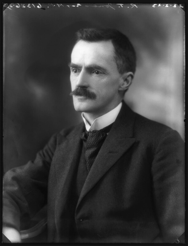 Rhys John Davies